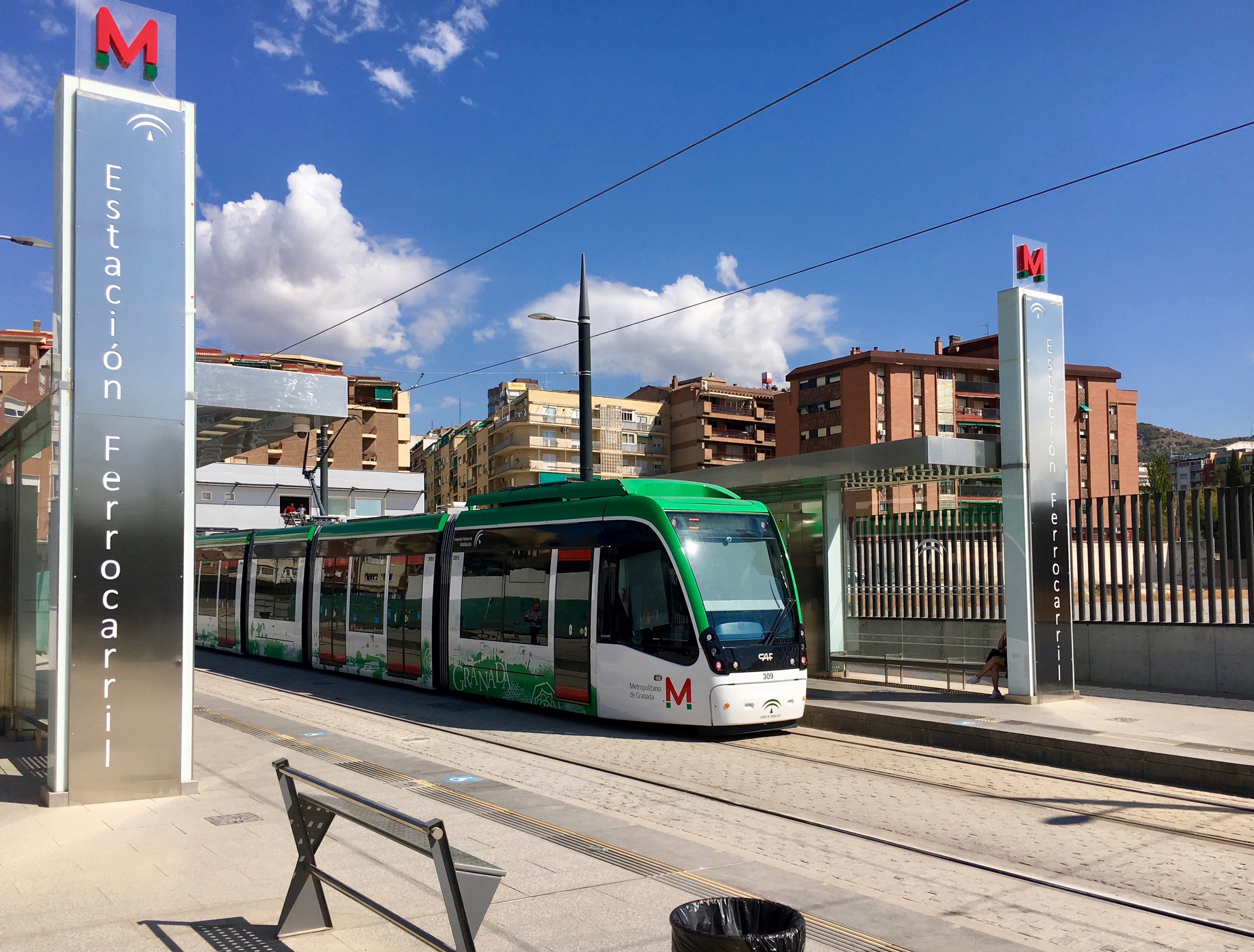 Estación Ferrocarril de Metro de Granada, situada junto a la Estación de Granada de Adif.